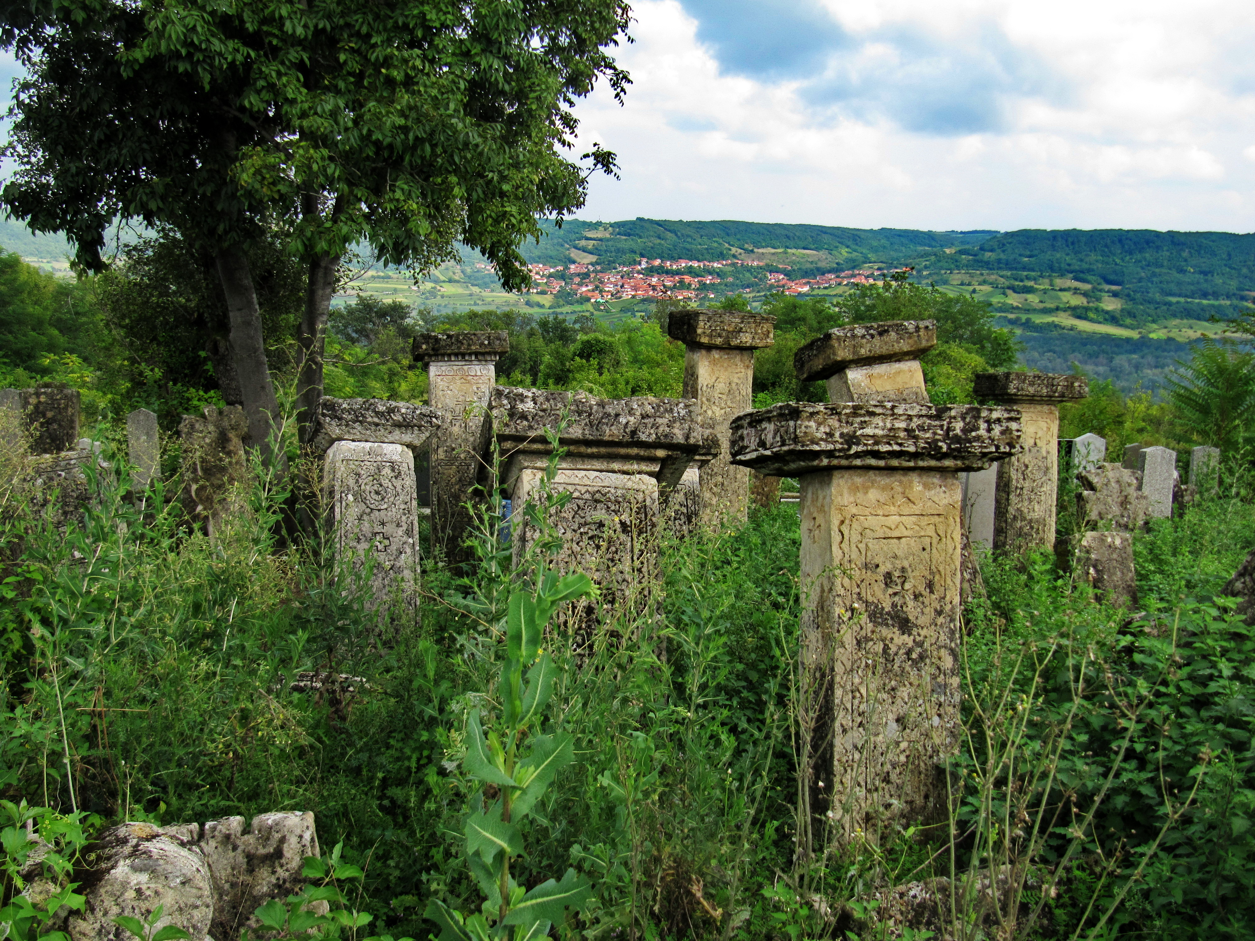 Rajac, Serbia